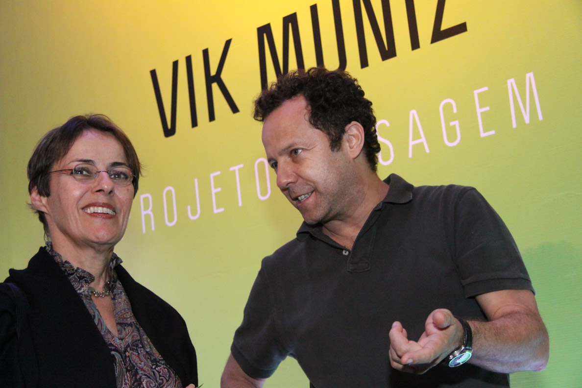 Ministra Ana de Hollanda e Vik Muniz, durante a exposição do artista plástico - Projeto Paisagem, na Rio+20.